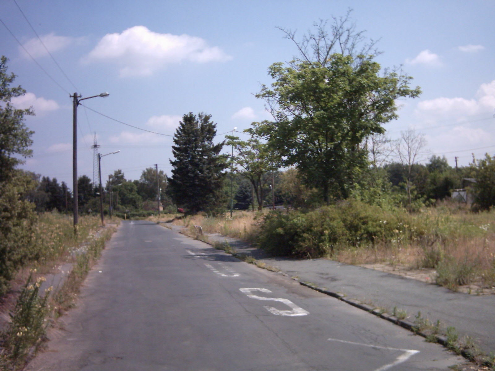 Der ehemalige Offenbacher Stadtteil Lohwald. Längst wächst Gras über dem ehemaligen sozialen Brennpunkt.